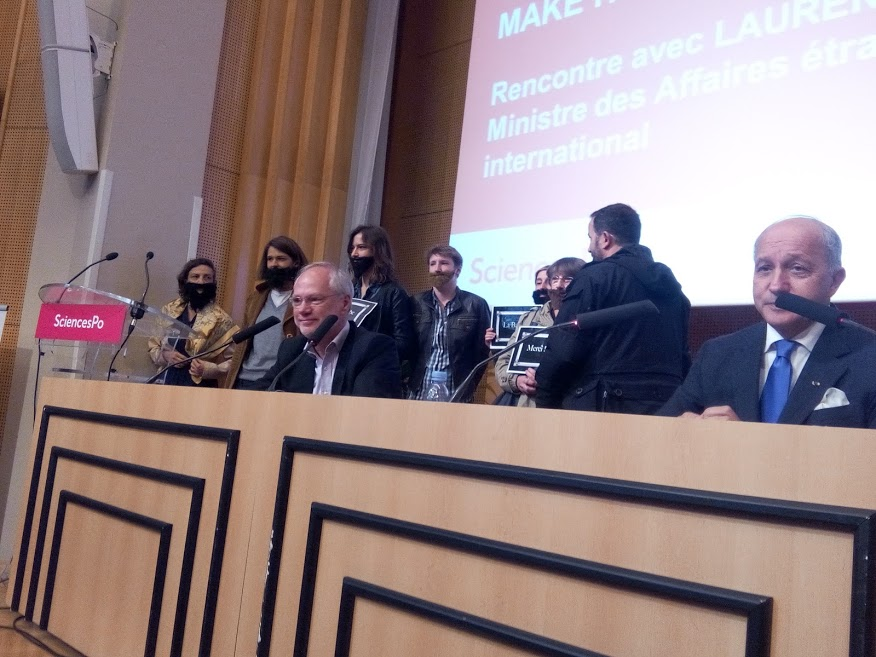 Barbage de Laurent Fabius et deLaurent Joffrin – Forum Libération " Make it Work " en préalable à la Cop 21, Paris, Institut des Sciences Politiques (Science-Po), samedi 3 octobre 2015, groupe d’action féministe La Barbe ! photo Mikado